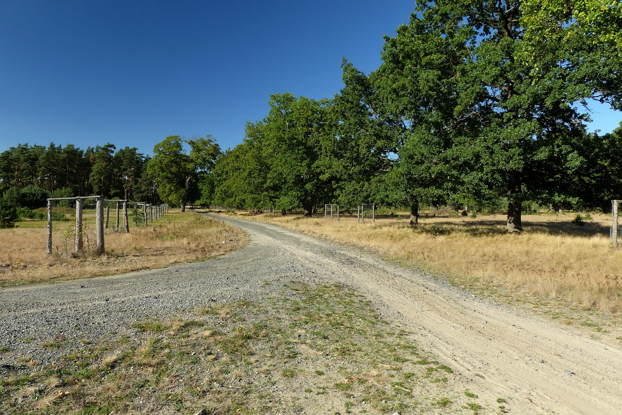 Bývalý Strážov